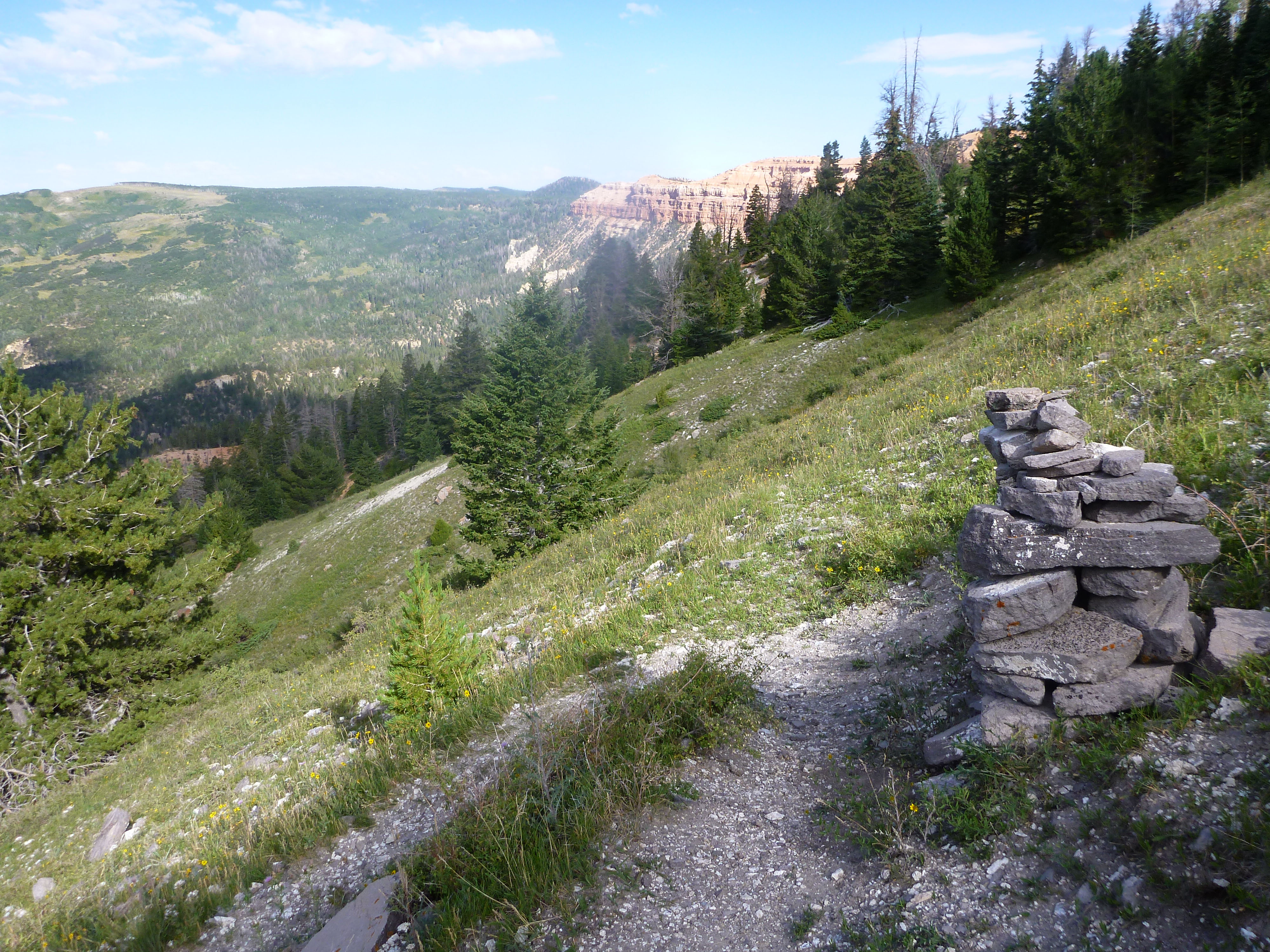 Rattlesnake Creek Trail